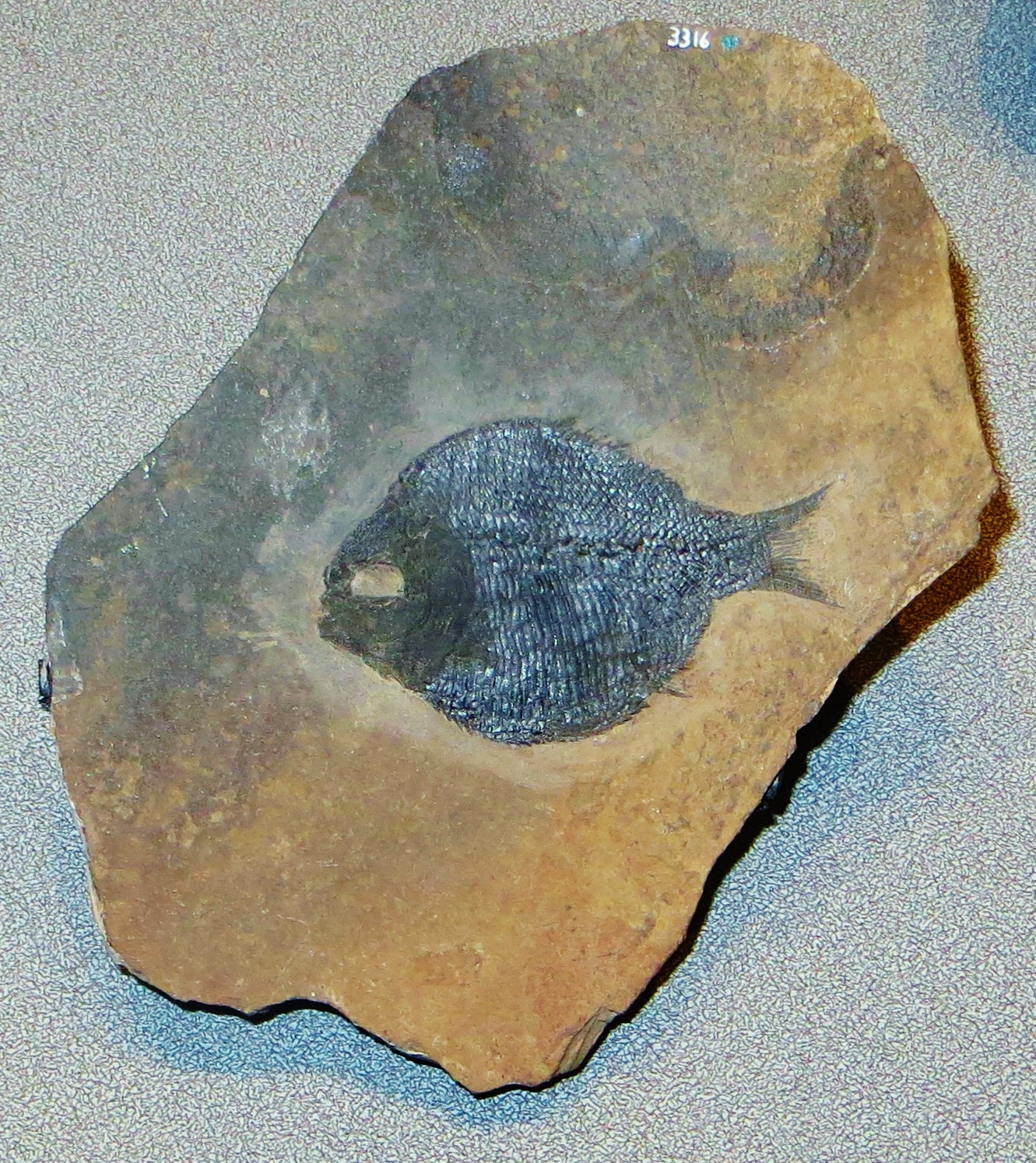 Fossil of Dapedium, an extinct fish- Took the picture at Museo di Scienze Naturali, Bergamo